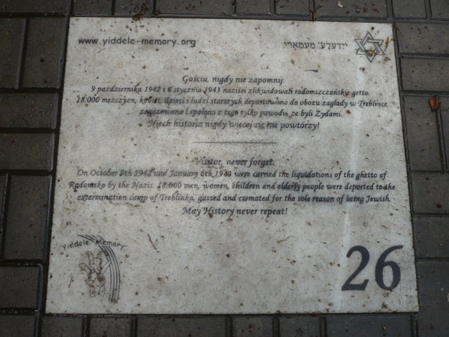 Radomsko. Otwarte Muzeum Żydowskie 26